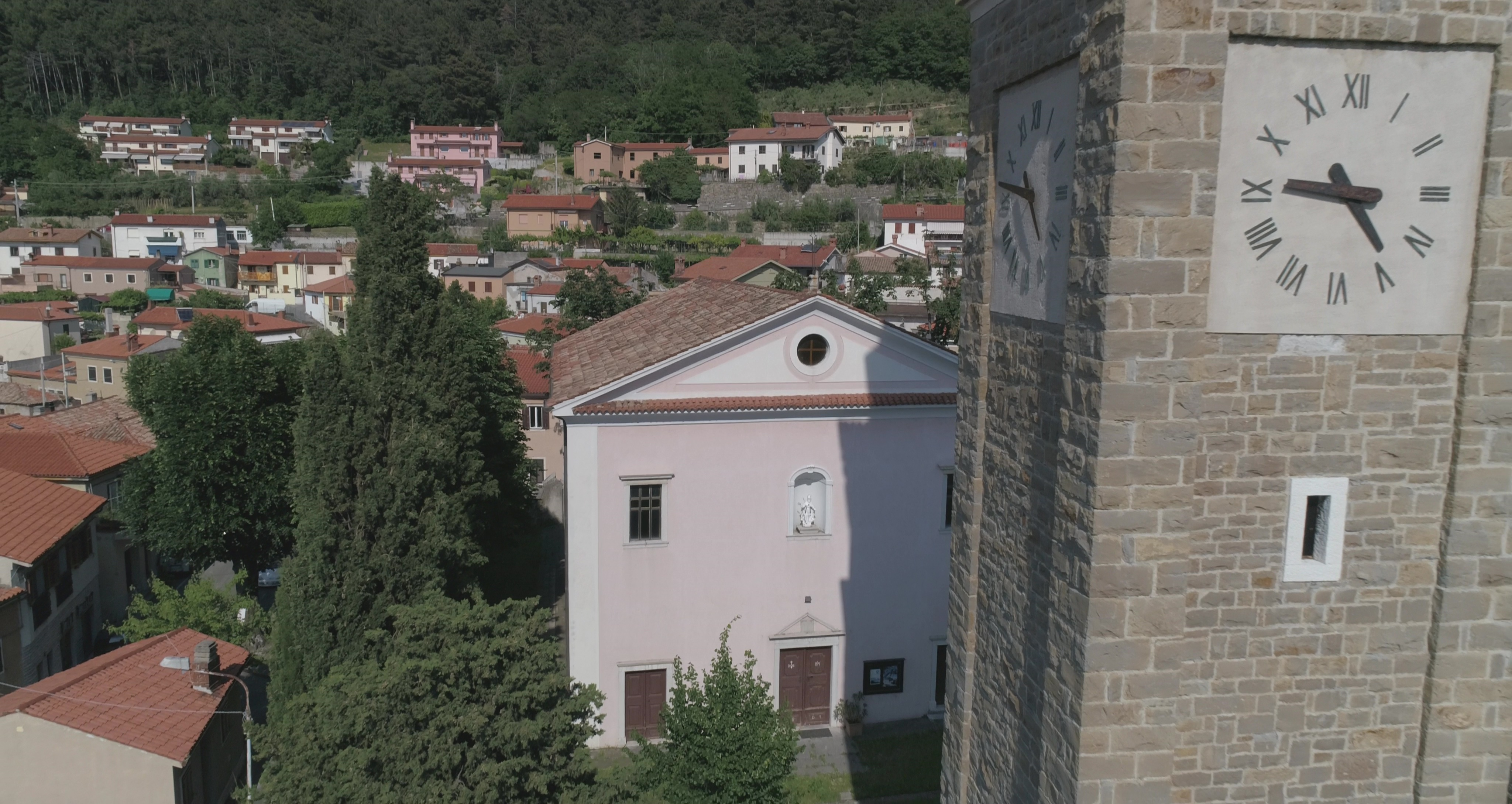 Facciata Chiesa Plebaniale di Sant'Ulderico a Dolina